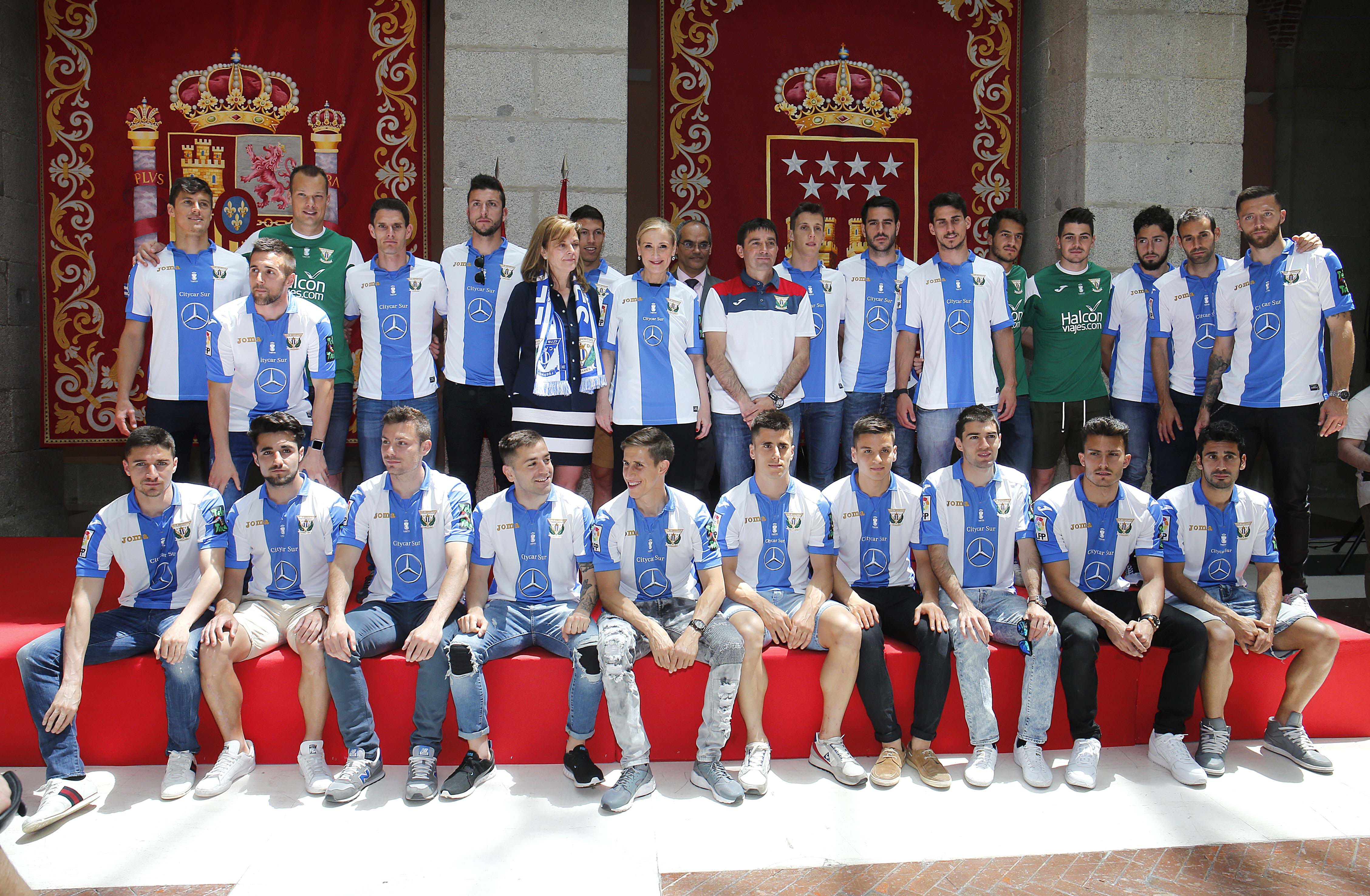 Felicidades pepineros!! Vuestro ascenso a Primera es la historia de un sueño, el resultado de vuestro trabajo y esfuerzo. Sois un orgullo para todo Madrid! Enhorabuena CD Leganés. #LeganésEsDePrimera